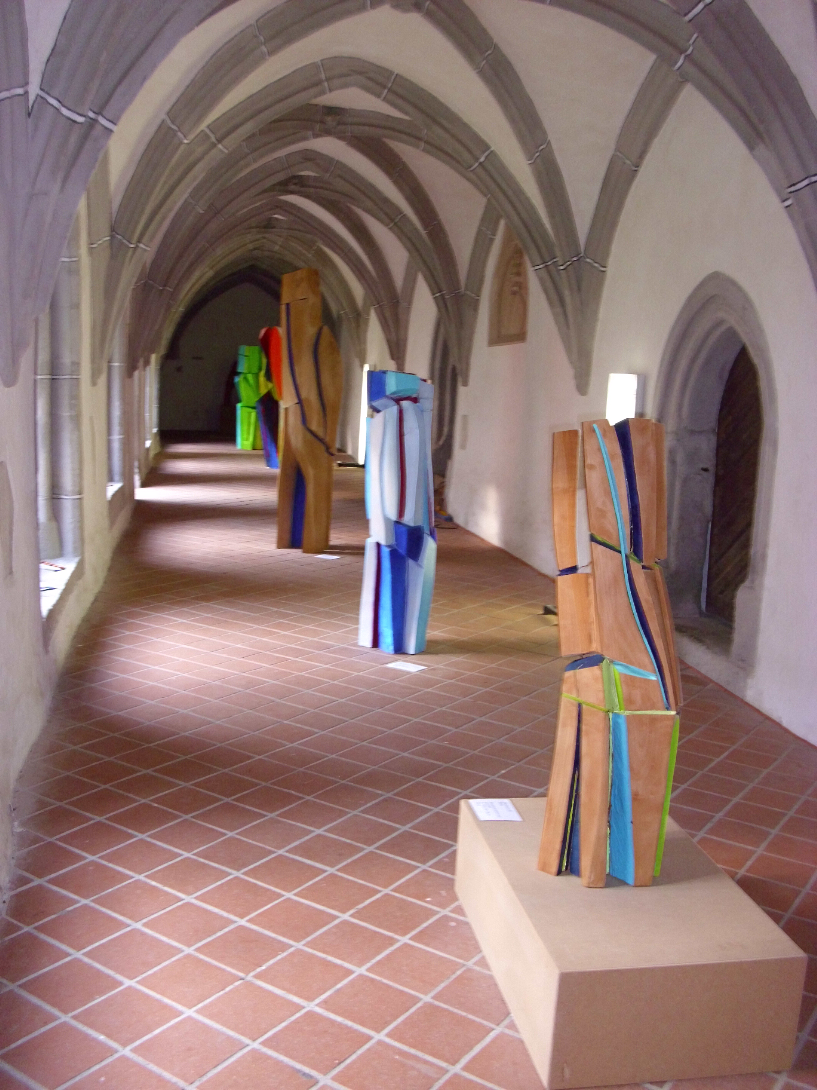 Bilder des Klosters Heidenheim, entstanden während des Ausstellungsprojektes „Kreuzgang/Münster St. Wunibald/Heidenheim“ im Sommer 2010